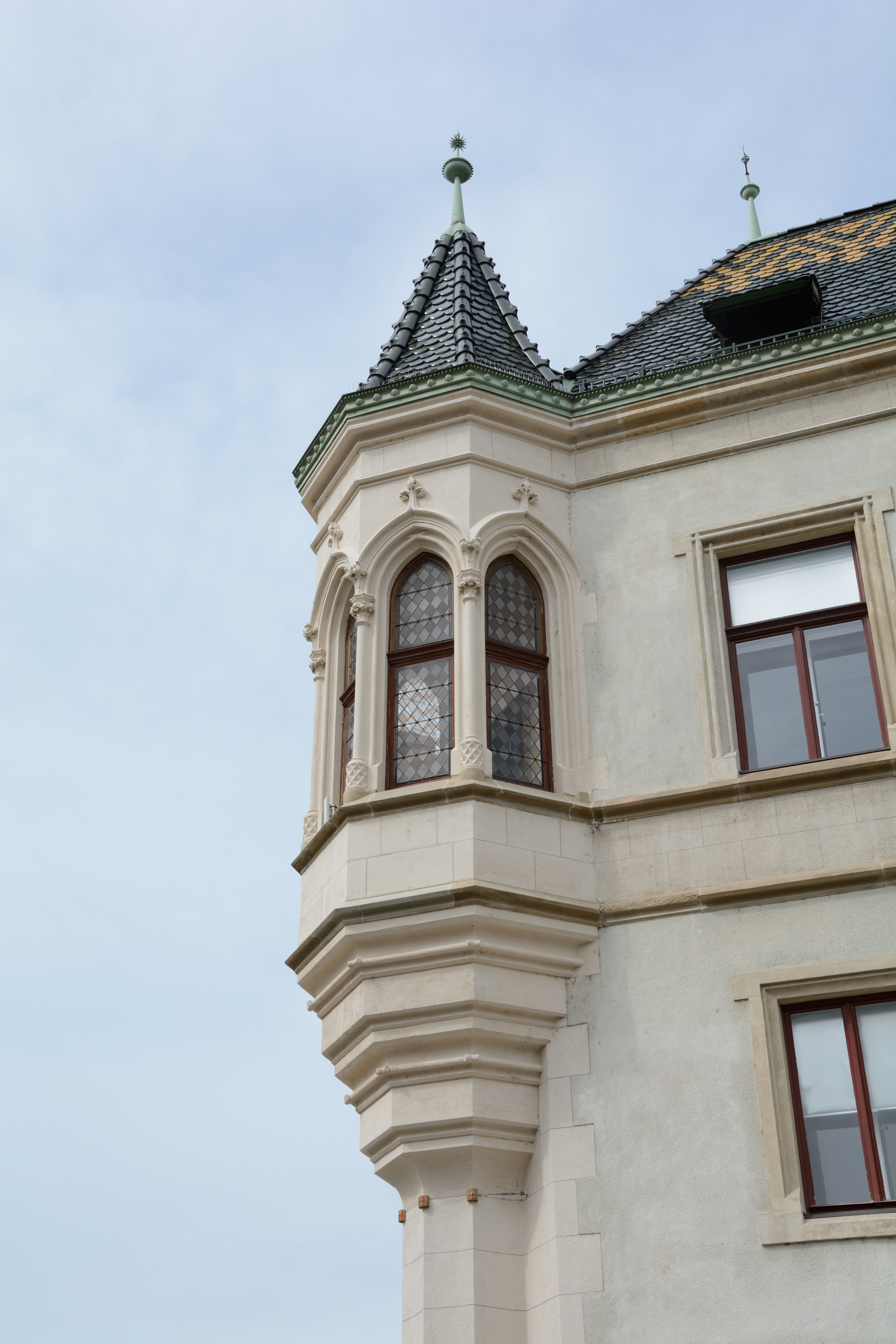 Rathaus Korneuburg mit Stadtturm